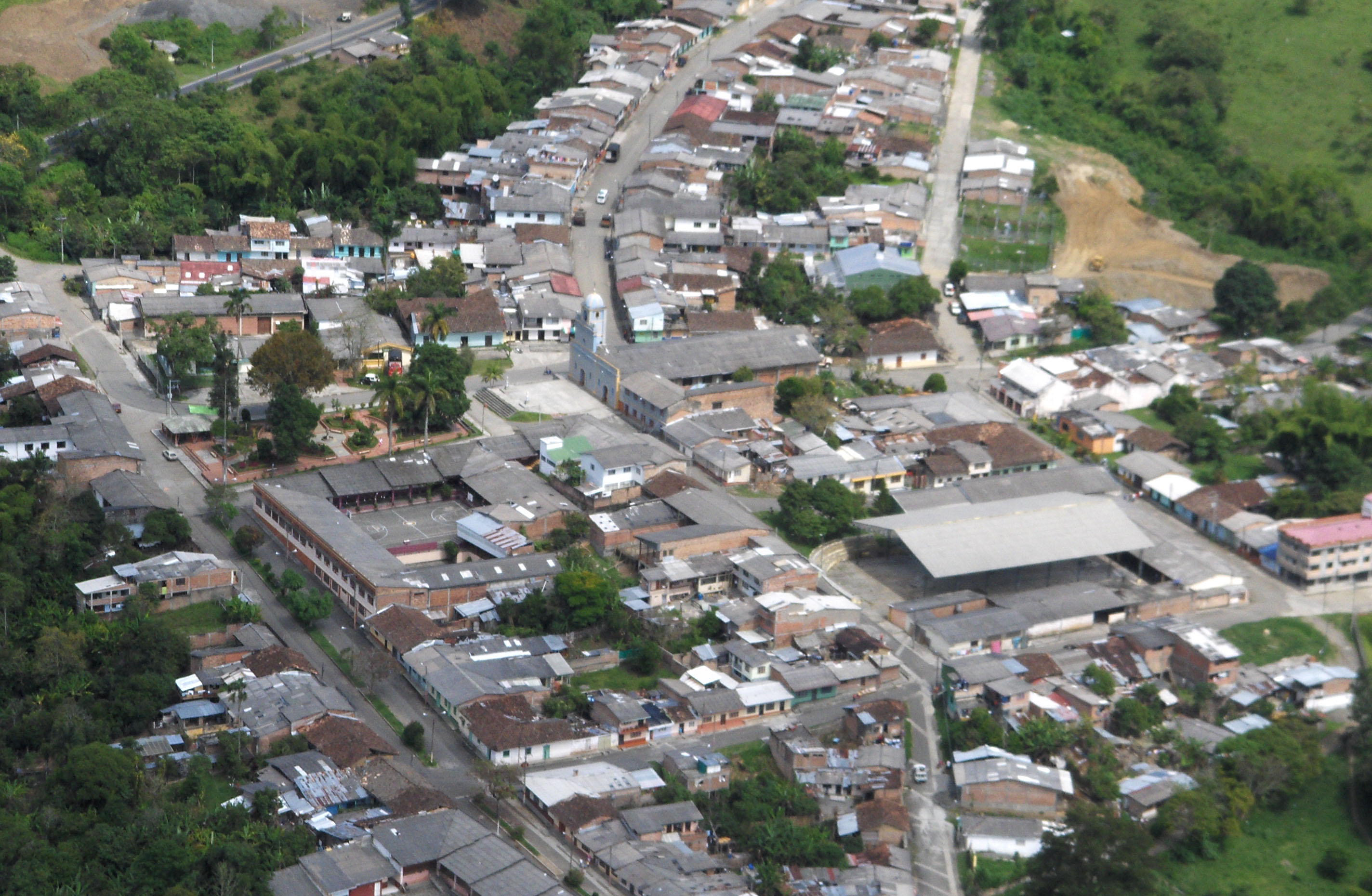 cabecera municipal - vista aerea - rodrigo quinayas rengifo